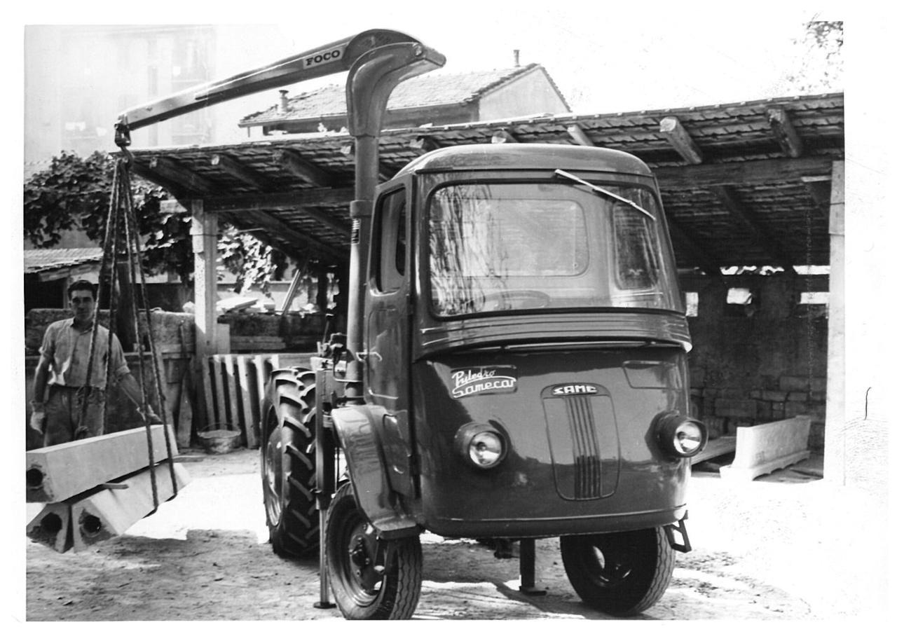 Samecar puledro